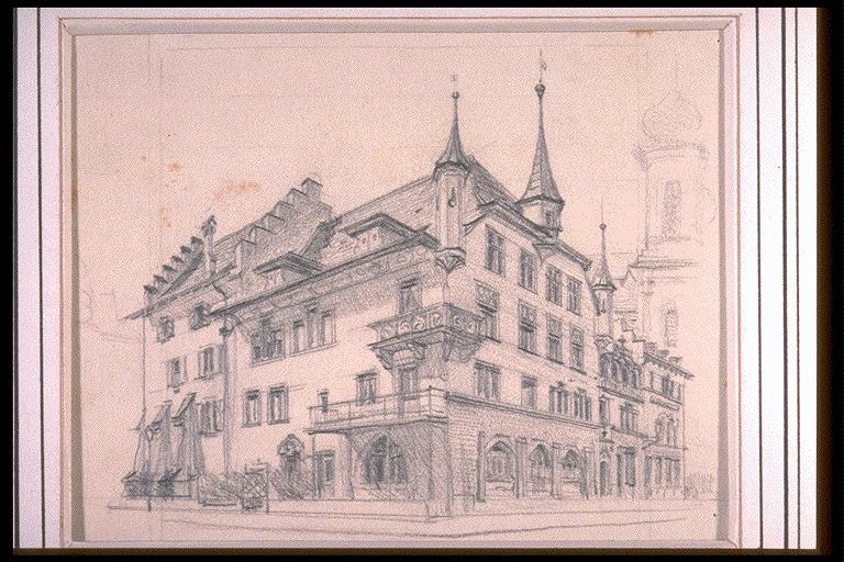 Bleistiftzeichnung; Bild 100 x 206 mm